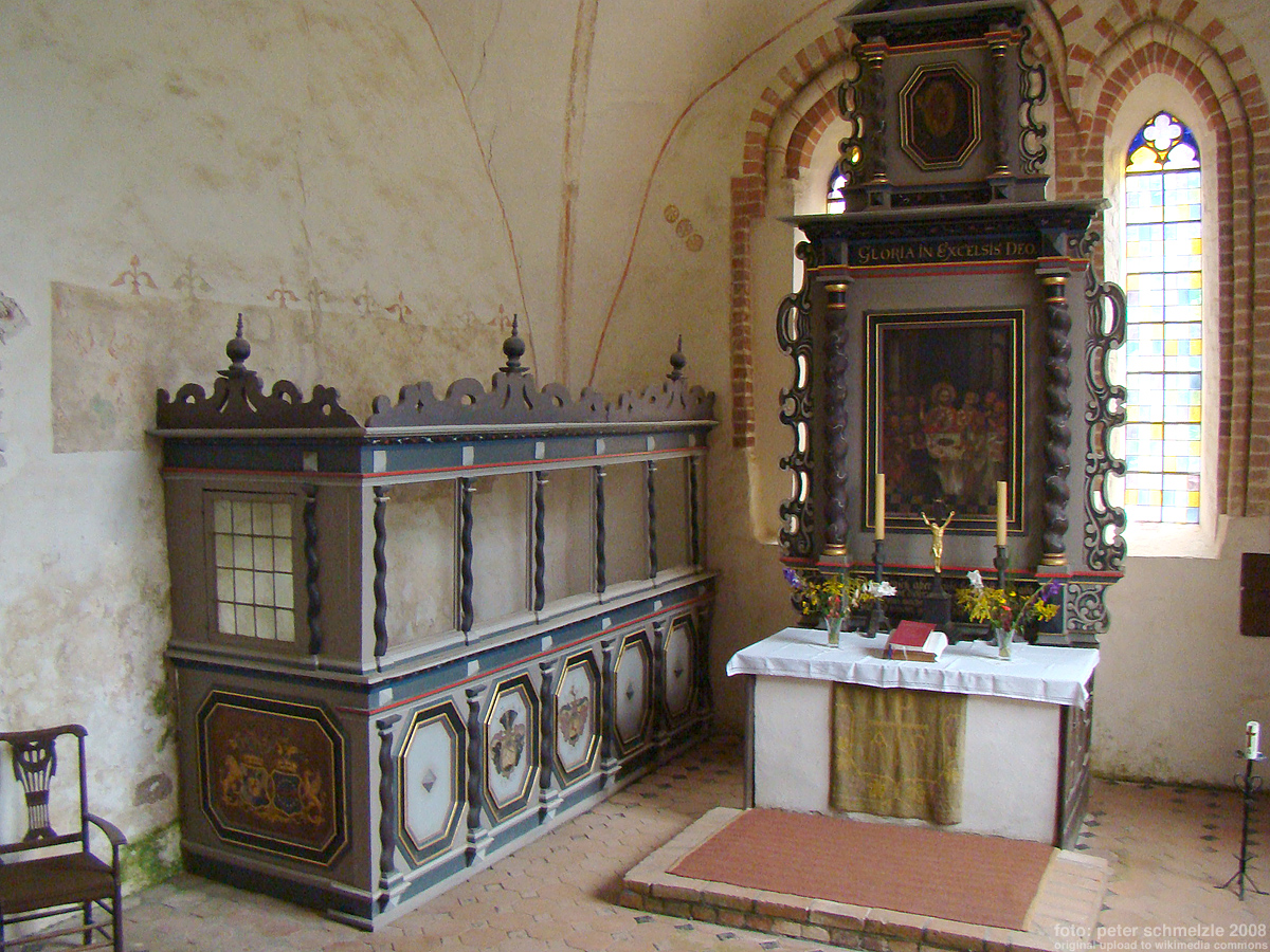 Dorfkirche Groß Gievitz, Blick in den Chor mit Patronatsloge und Altar